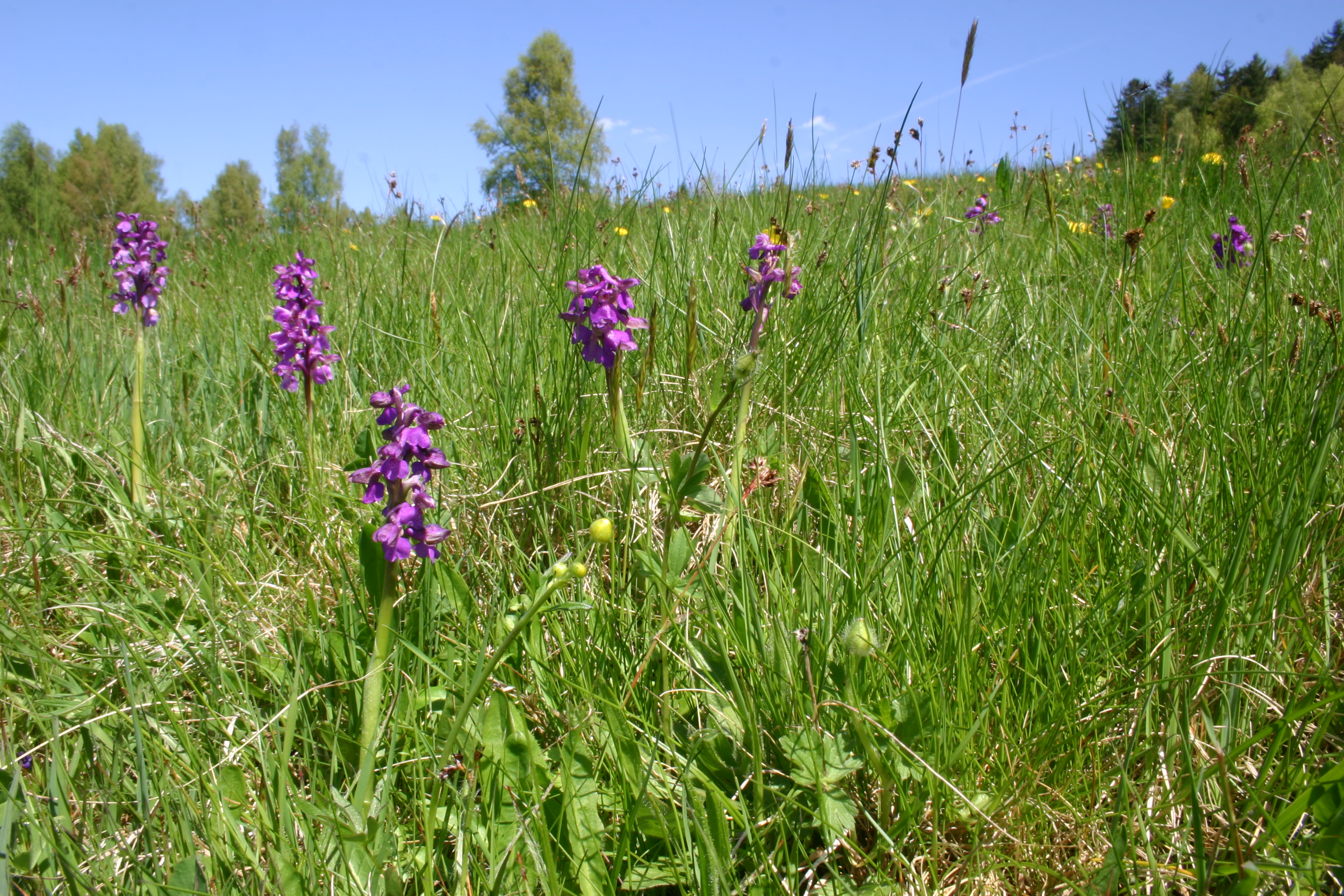 Kvetoucí vstavače kukačky na Těšovských pastvinách.